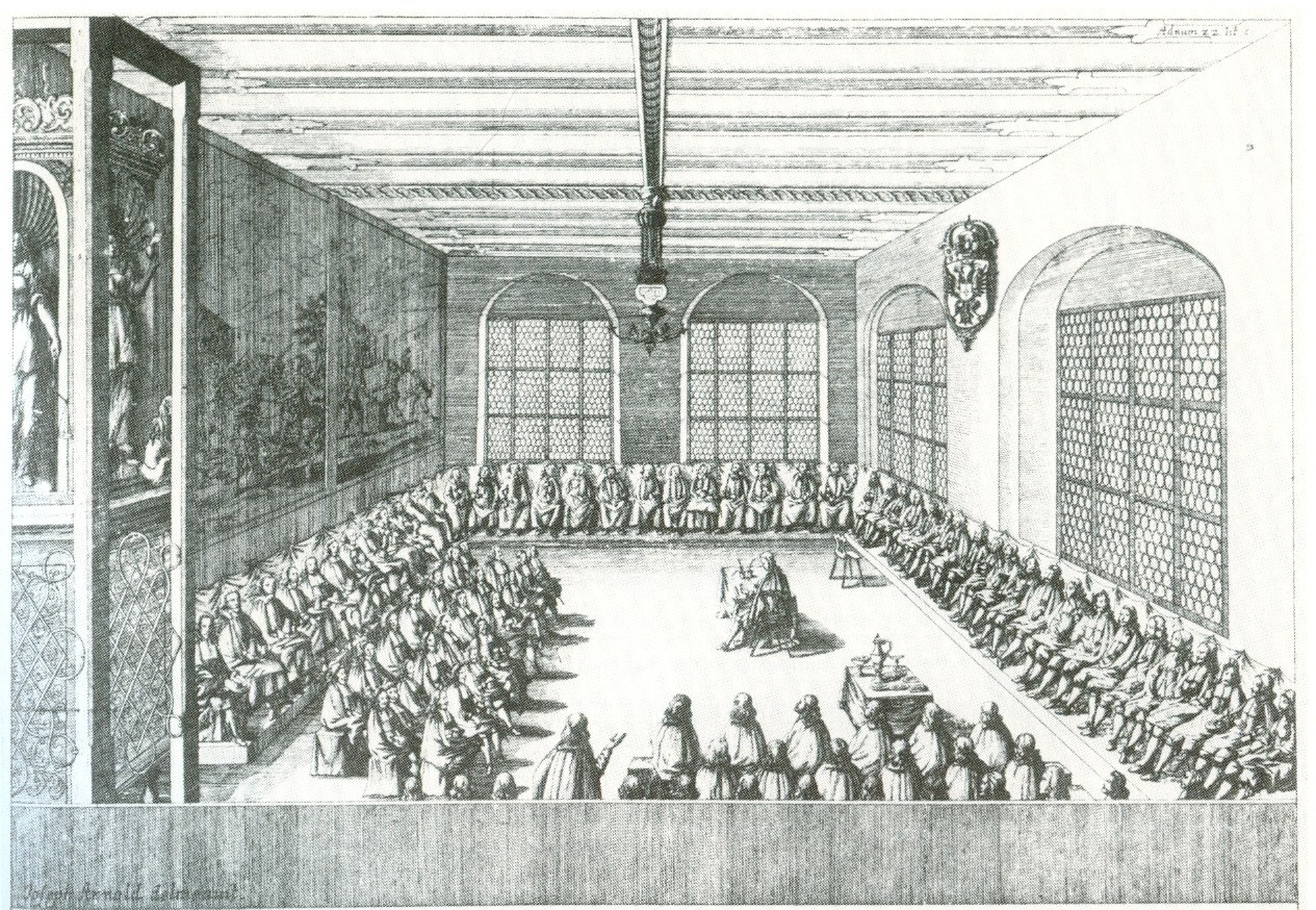 Feierliche Sitzung des Schwäbischen Kreises im Ulmer Rathaussaal Kupferstich Ulm, Stadtarchiv, F3, Ansicht 620